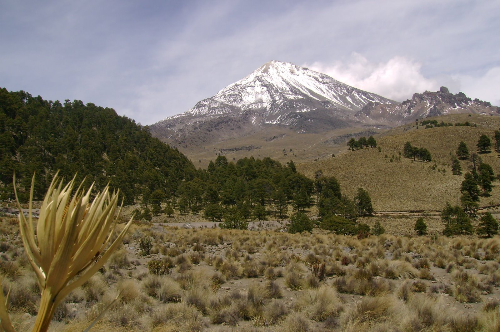 Pico de Orizaba Fotografia tomada por: Isaac Ramirez Chiunti